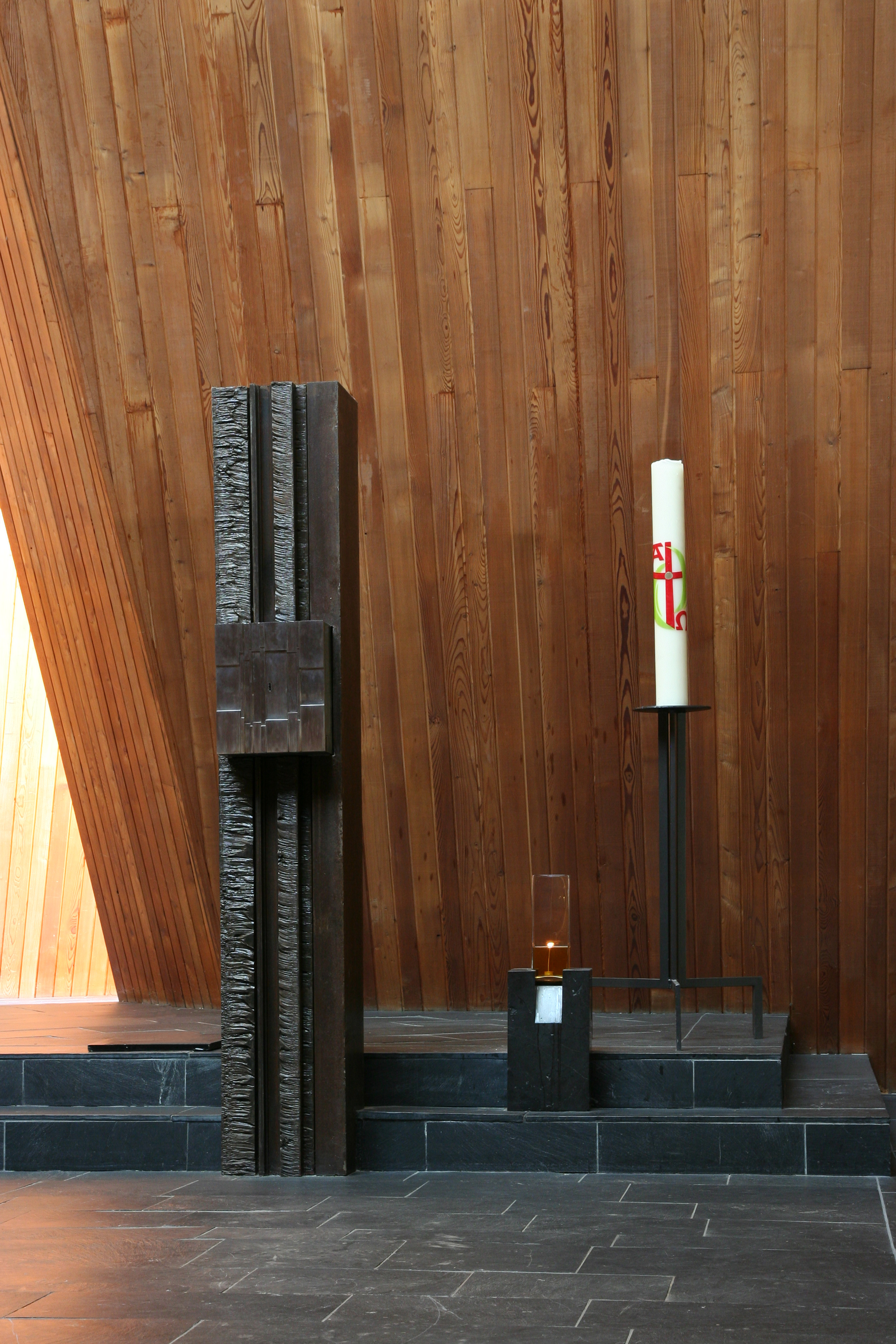 Römisch-katholische Pfarrkirche Maria Krönung Zürich-Witikon, Architektur von Justus Dahinden, Altarraum von Georg Malin